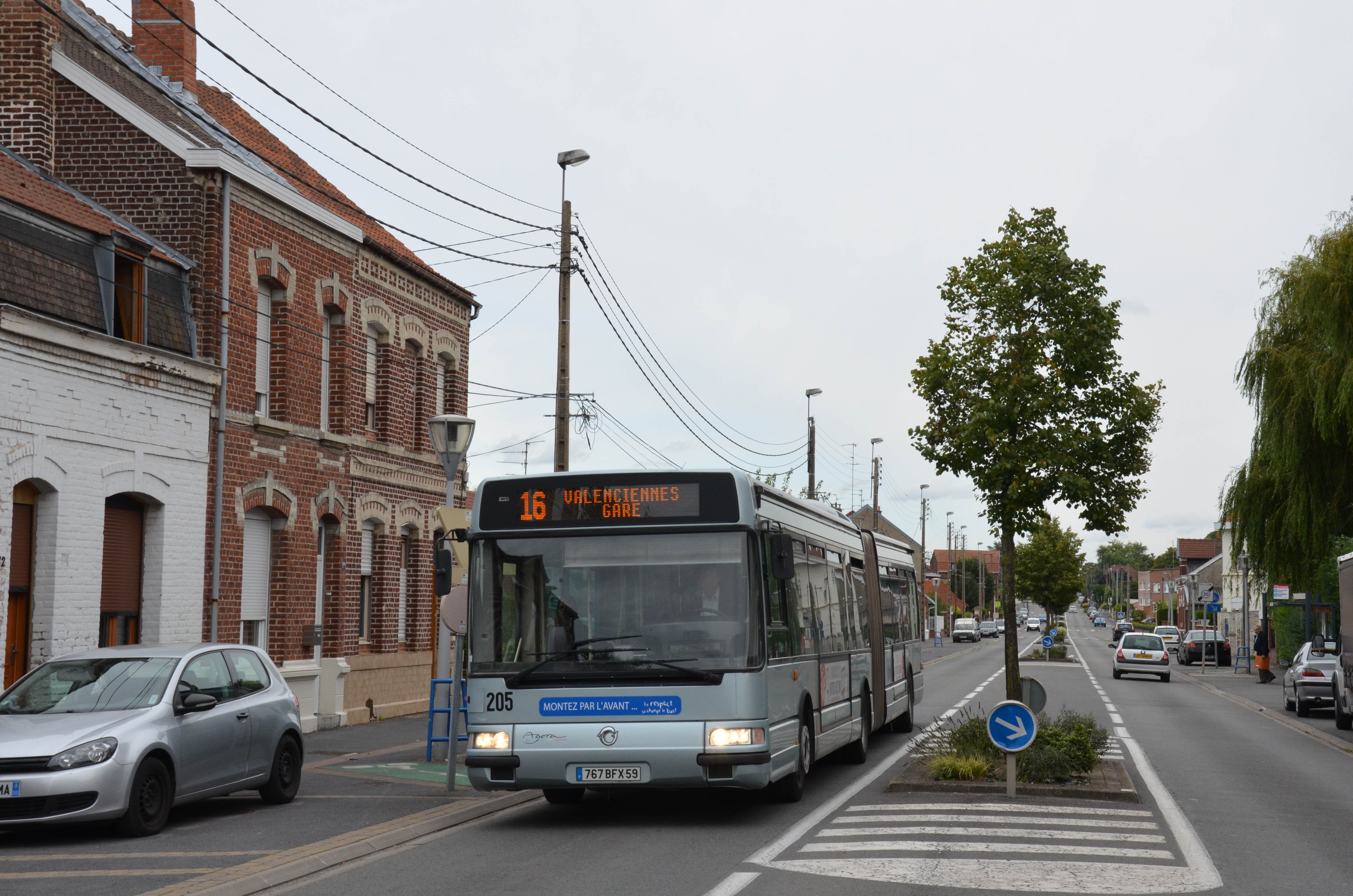 Irisbus Agora L n°205 sur la ligne 16 du réseau TRANSVILLES de Valenciennes, près de l'arrêt Saint-Saulve Douane.